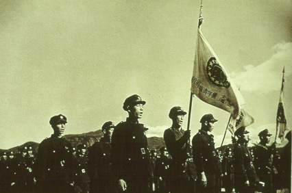 조선민족청년단의 모습(1946.10)